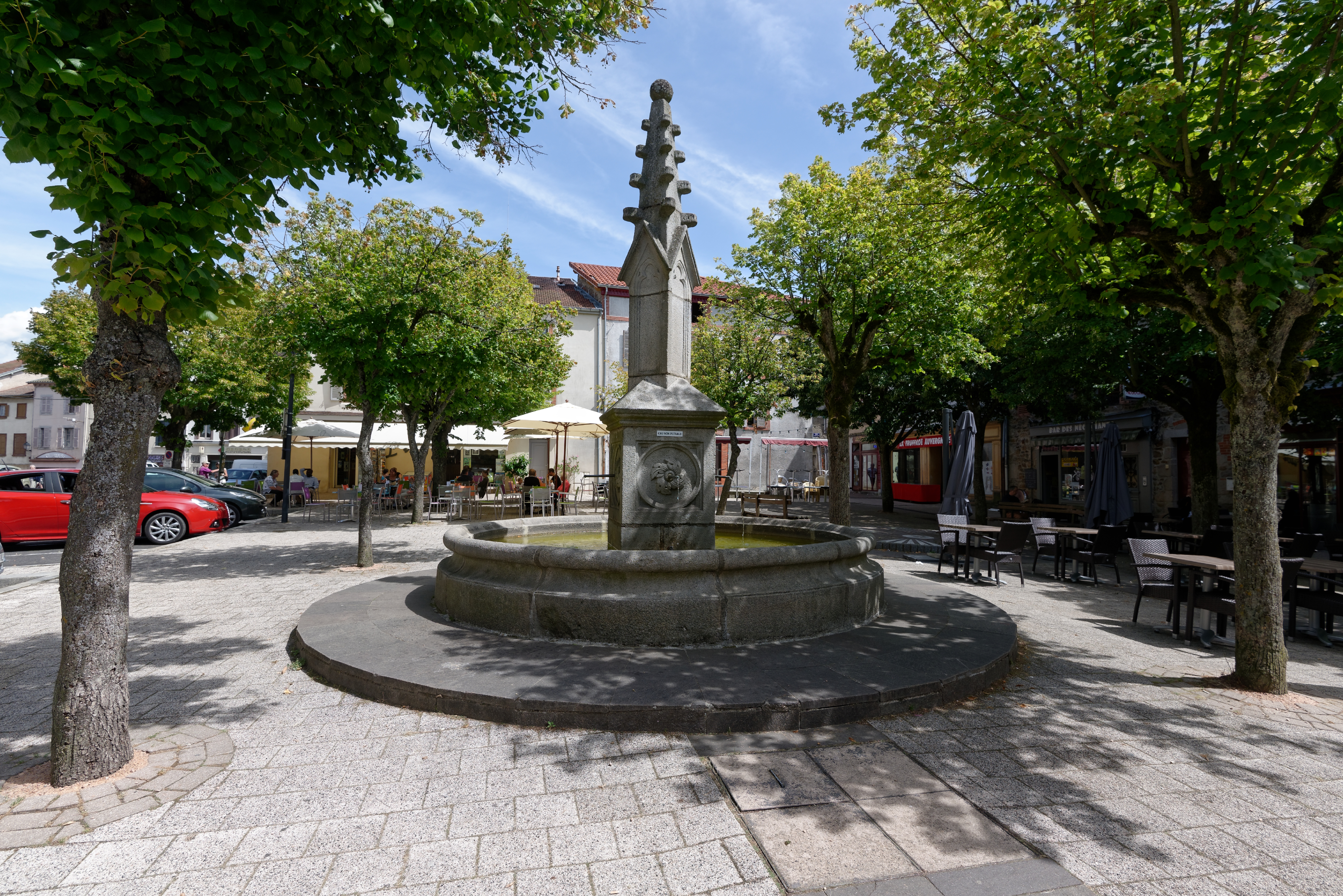 Fontaine de la place Saint-Jean à Ambert, Puy-de-Dôme.